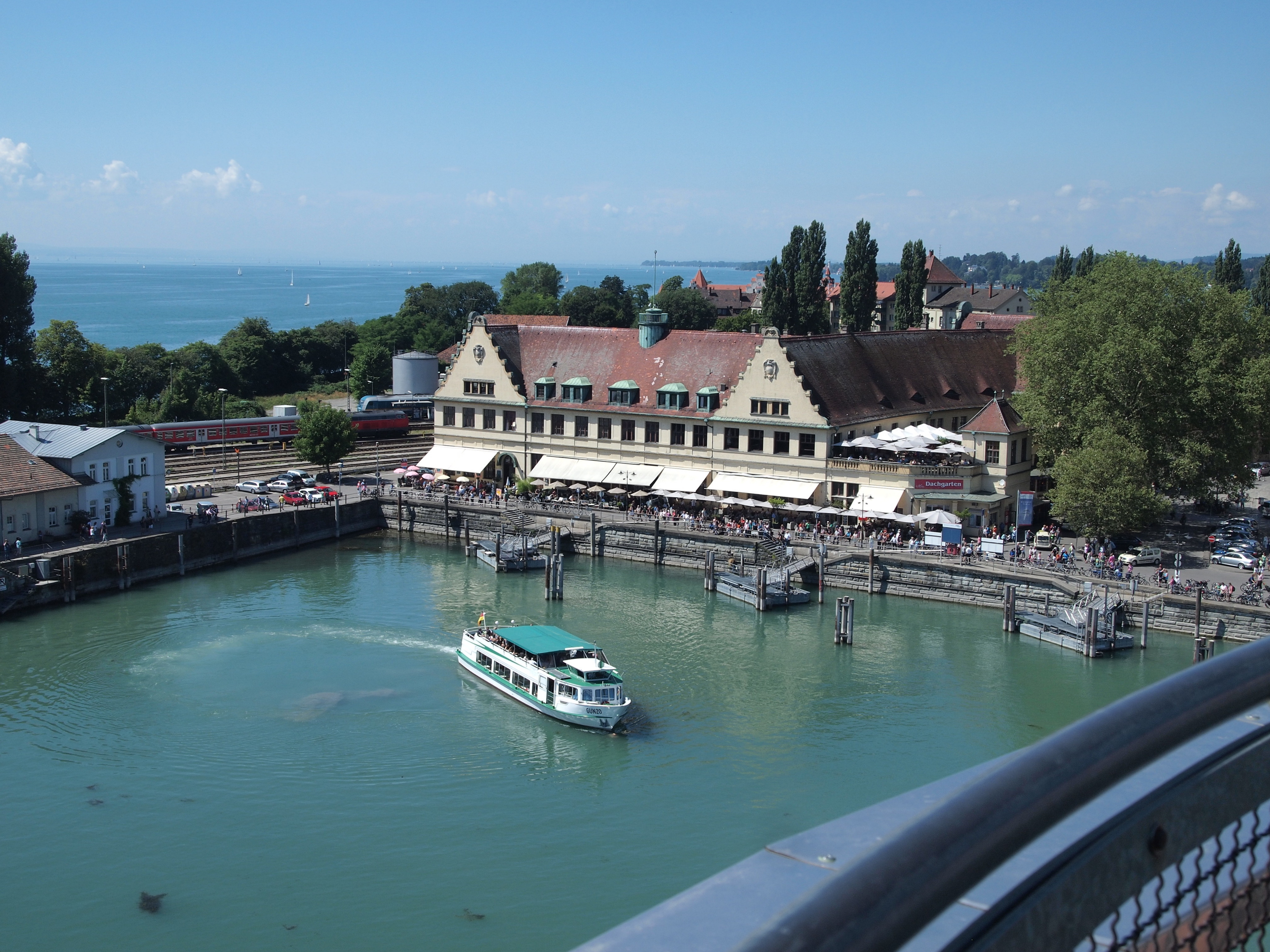 Lindauer Hauptbahnhofsgebäude aus Leuchtturmperspektive